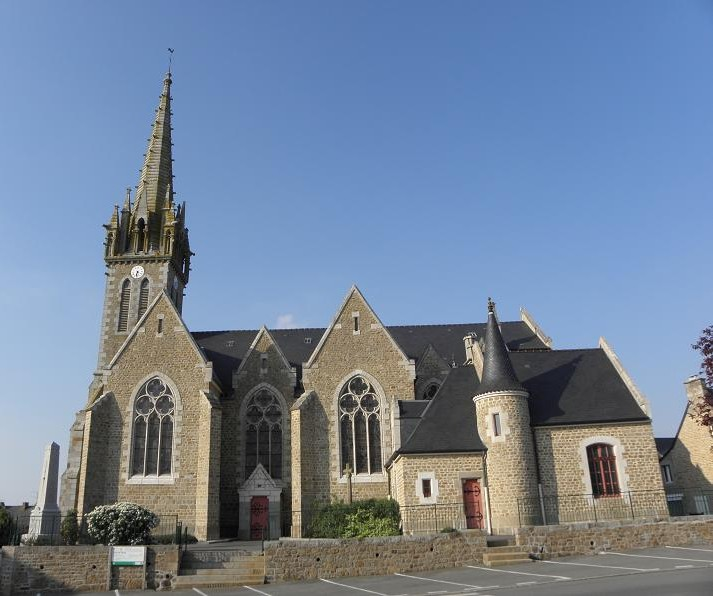 Église de La Bazouge-du-Désert (35).